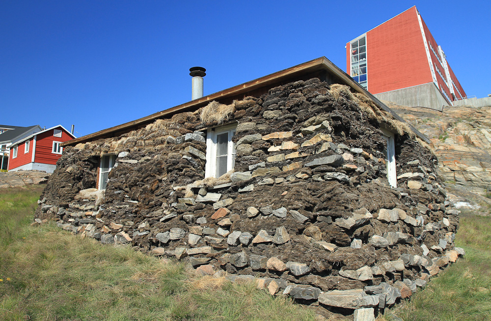 Altes und neues Umanaq, Westgrönland